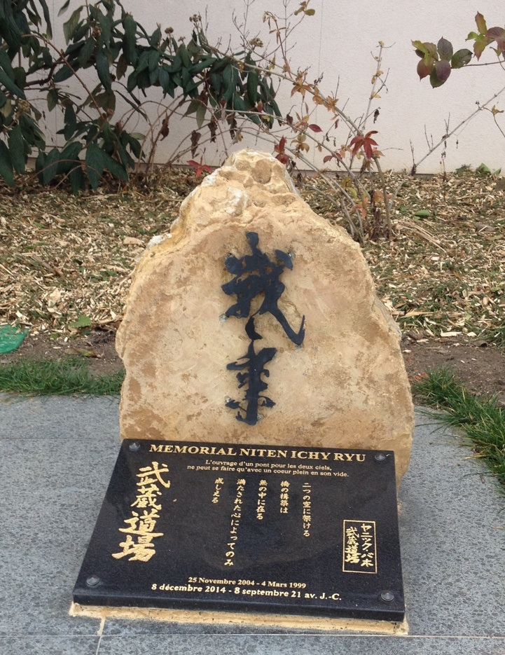 L’une des trois stèle du Mémorial Niten-Ichi-Ryu, Senki et rappelant les dates de fondation et d’inauguration.